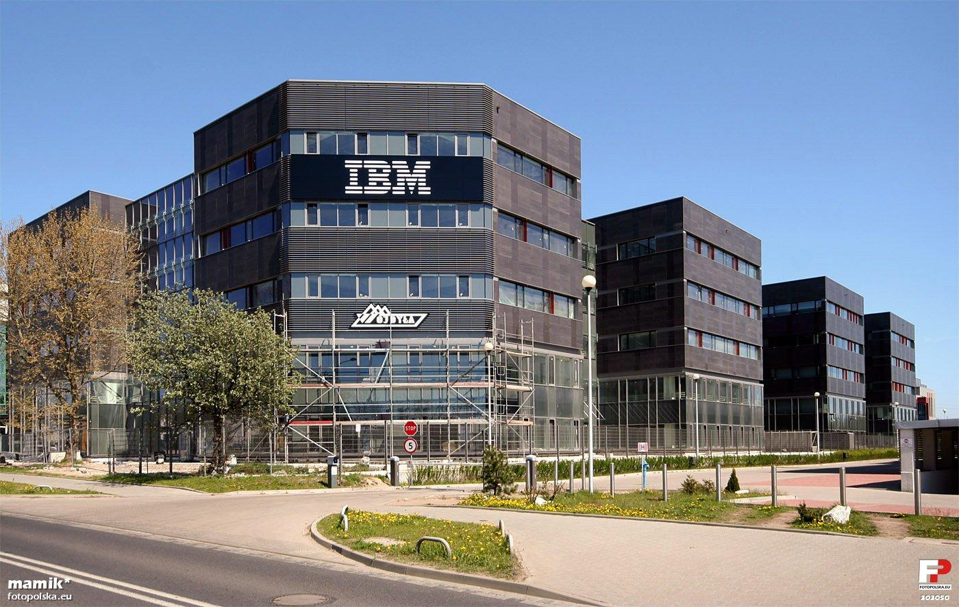 Budynek już ukończony. Pojawiło się logo głównego najemcy